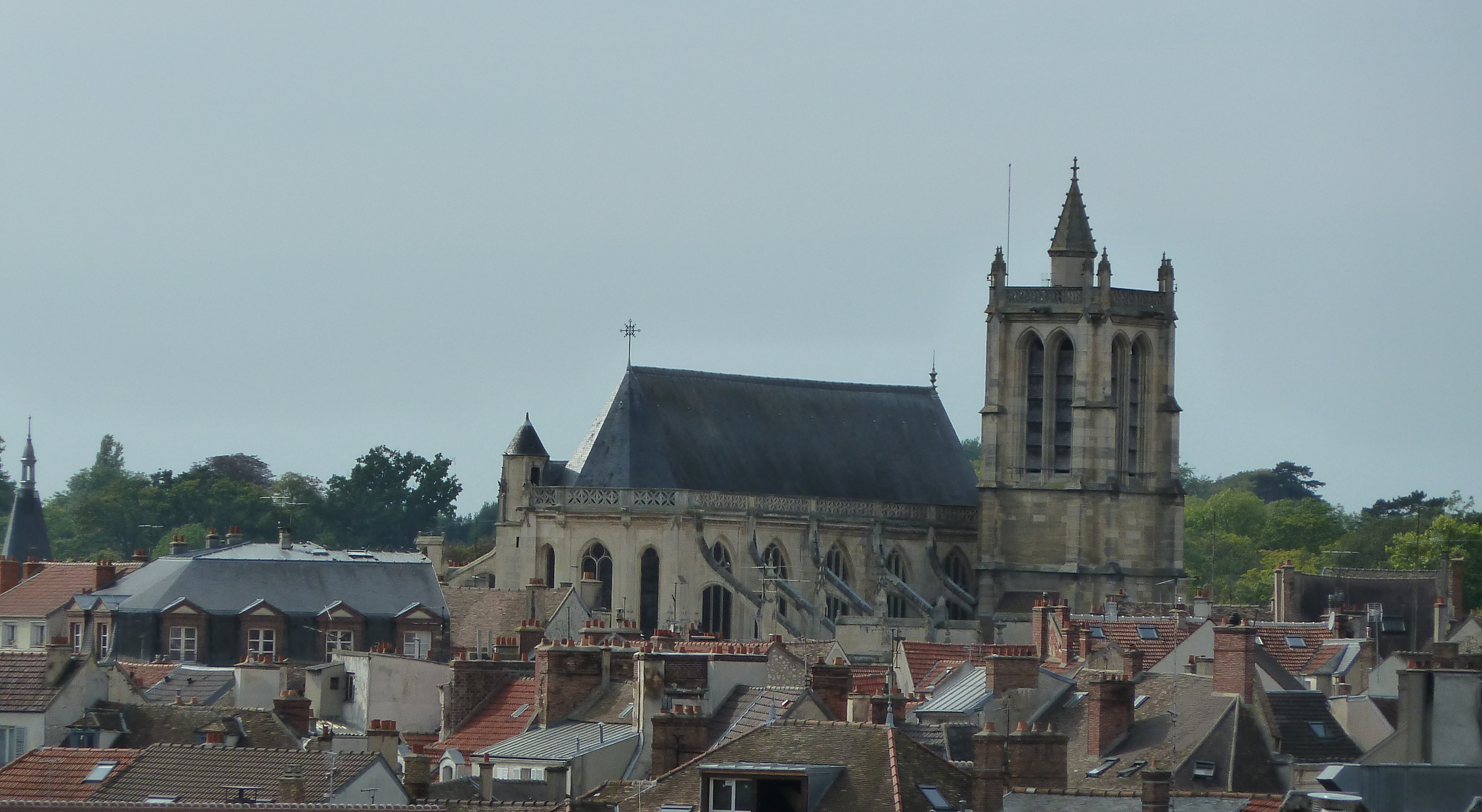 Sur les escaliers des Recollets, zoom sur le gothique flamboyant de l'église St Aspais dominant les toits de la ville de Melun. .